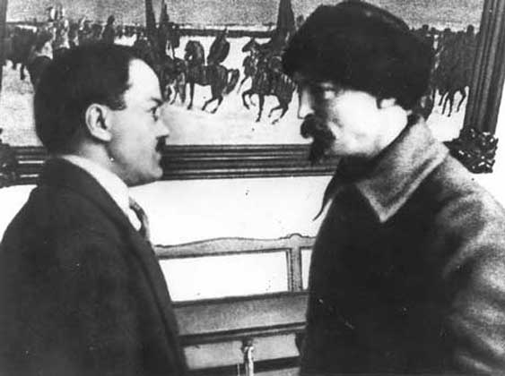 В.М.Молотов и Ф. Э. Дзержинский в Кремле. Москва.